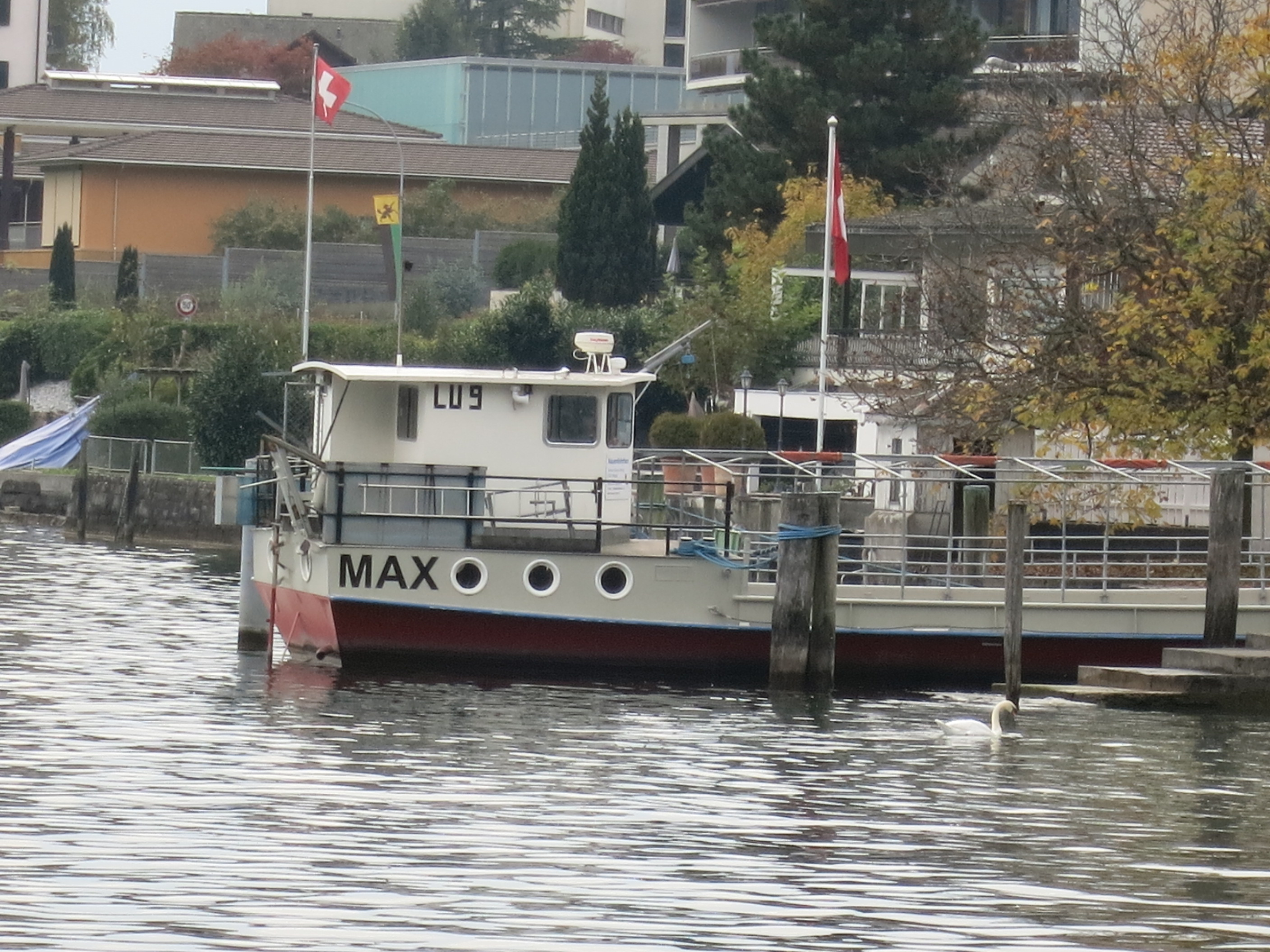 Nauen, Weggis LU, Schweiz